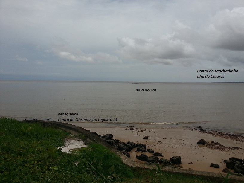 Local das observações de 22/11/1977 na Baia do Sol, Ilha do Mosqueiro, em frente a igreja do Divino Espirito Santo. As observações foram registradas no documento Registro de Observações de OVNI - I COMAR, números 39, 40 e 41.